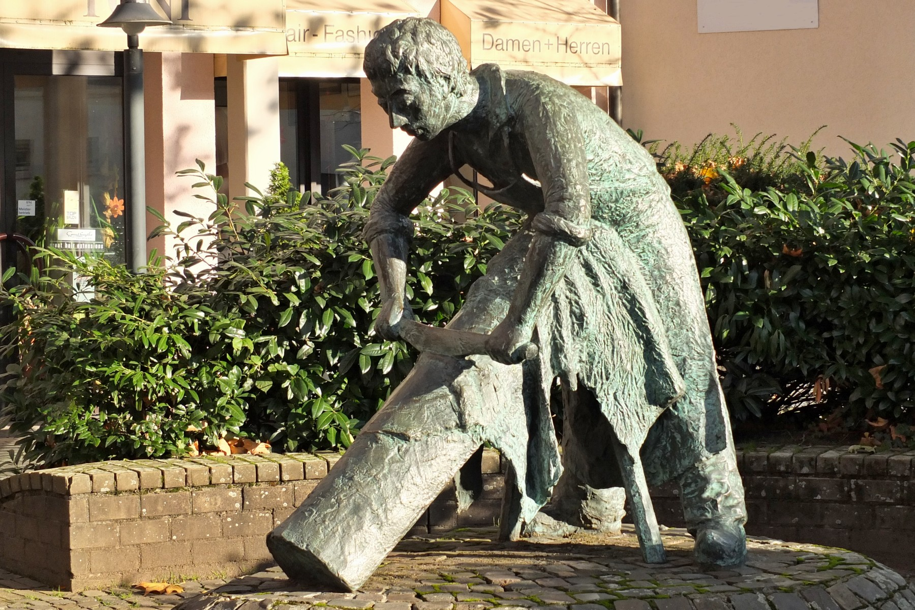 Der Gerber, Plastik von Olaf Höhnen, Hilden, Mühlenstraße 7, enthüllt am 17. Oktober 1986